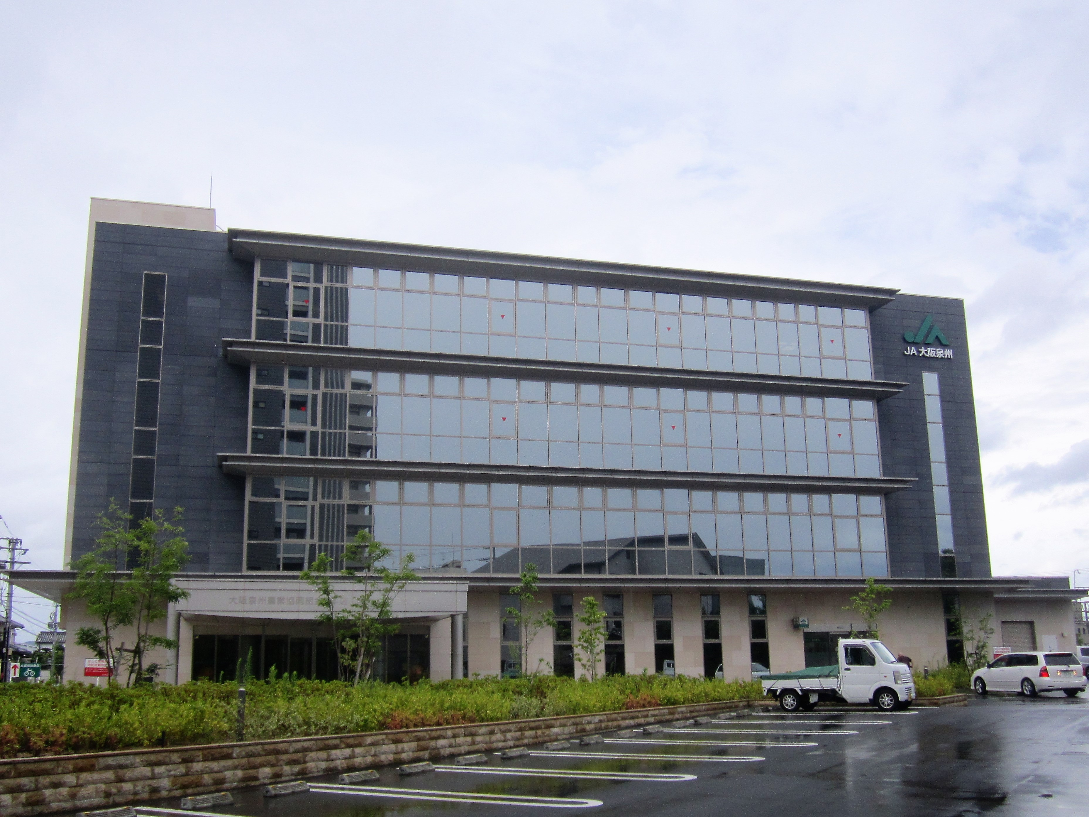 大阪泉州農業協同組合 本店・泉佐野中央支店（泉佐野市日根野）